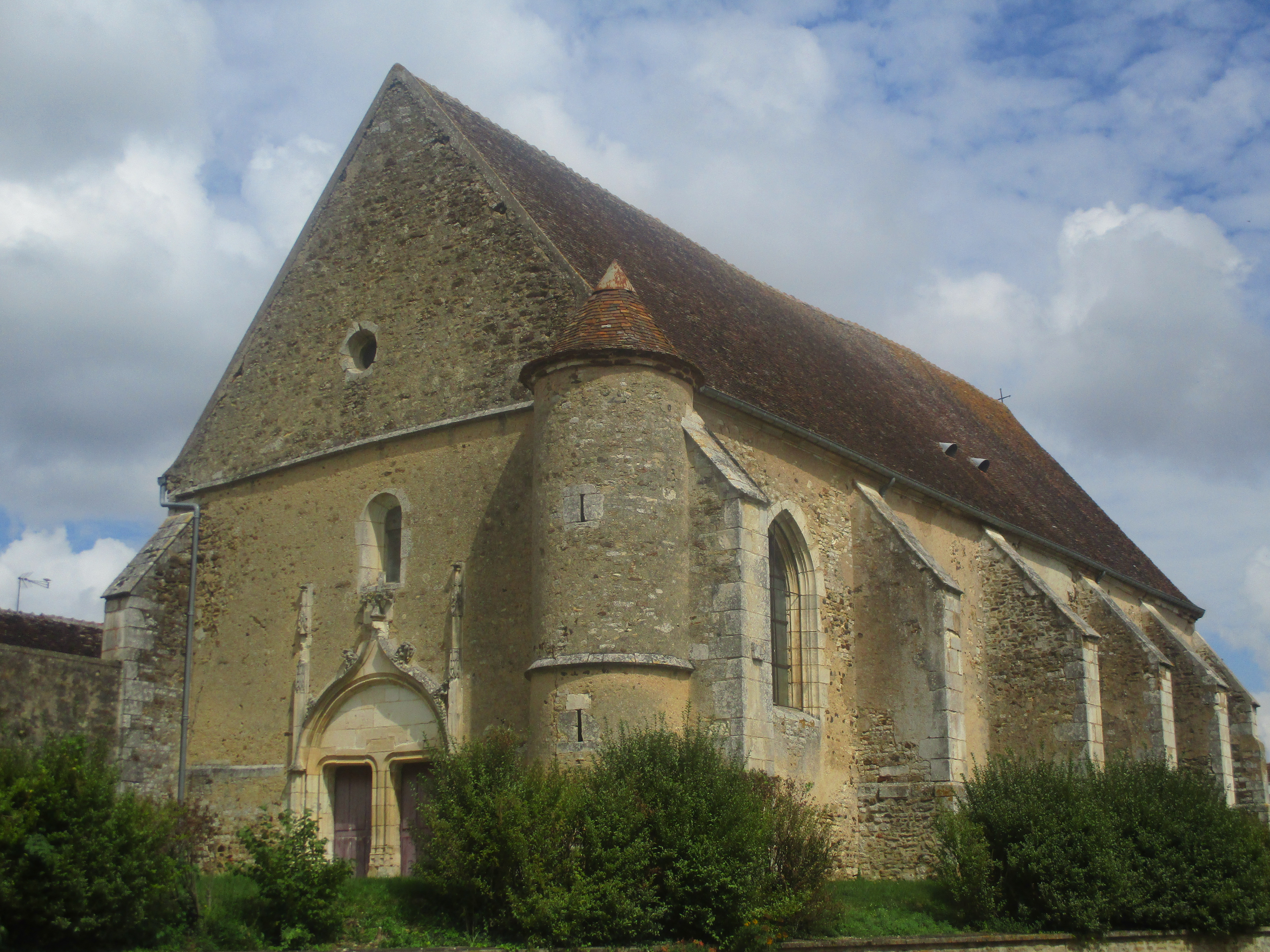 Vue de l'église Saint-Pierre de Venouse (XVe-XVIe siècles).